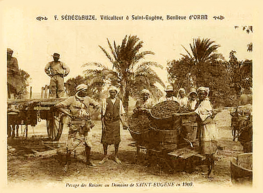 Vendange en 1909 au domaine Saint-Eugène à Oran